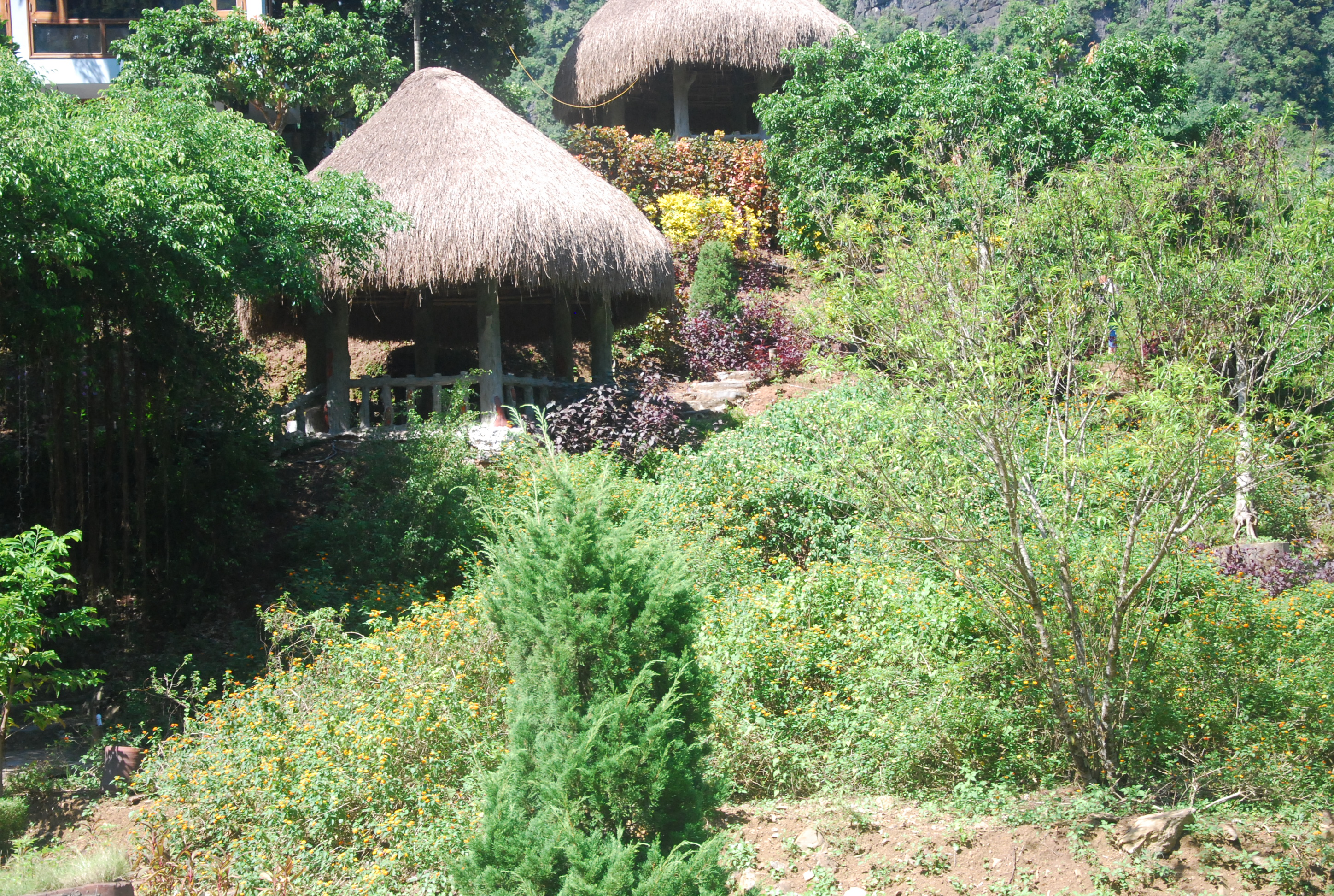 Phong cảnh Khu du lịch sinh thái Thung Nham ở Ninh Bình